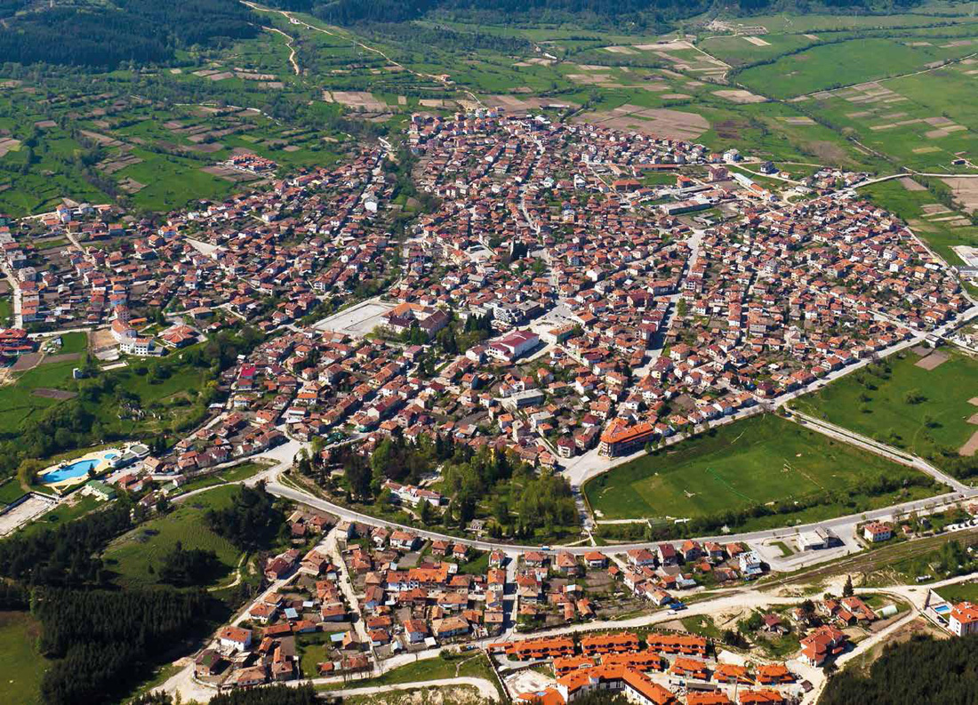 Добринище